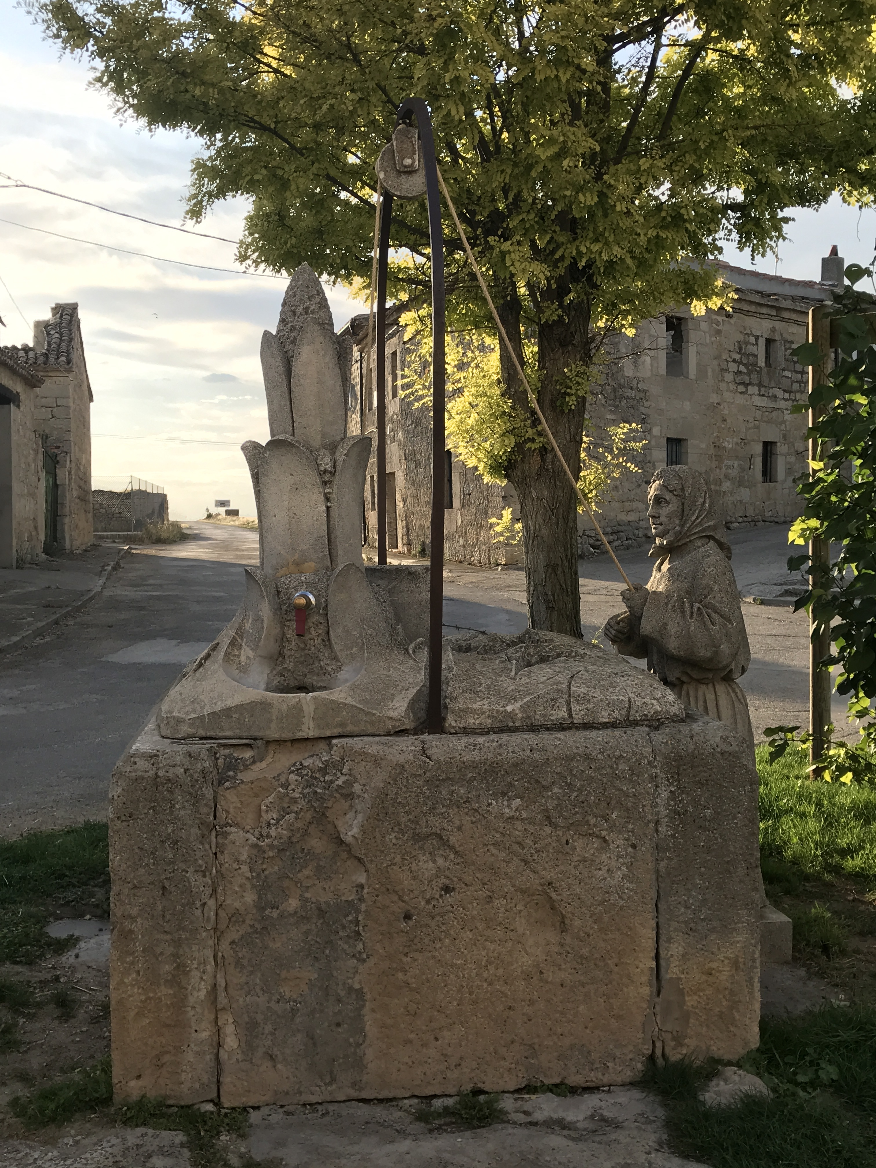 PozoCitoresParamo